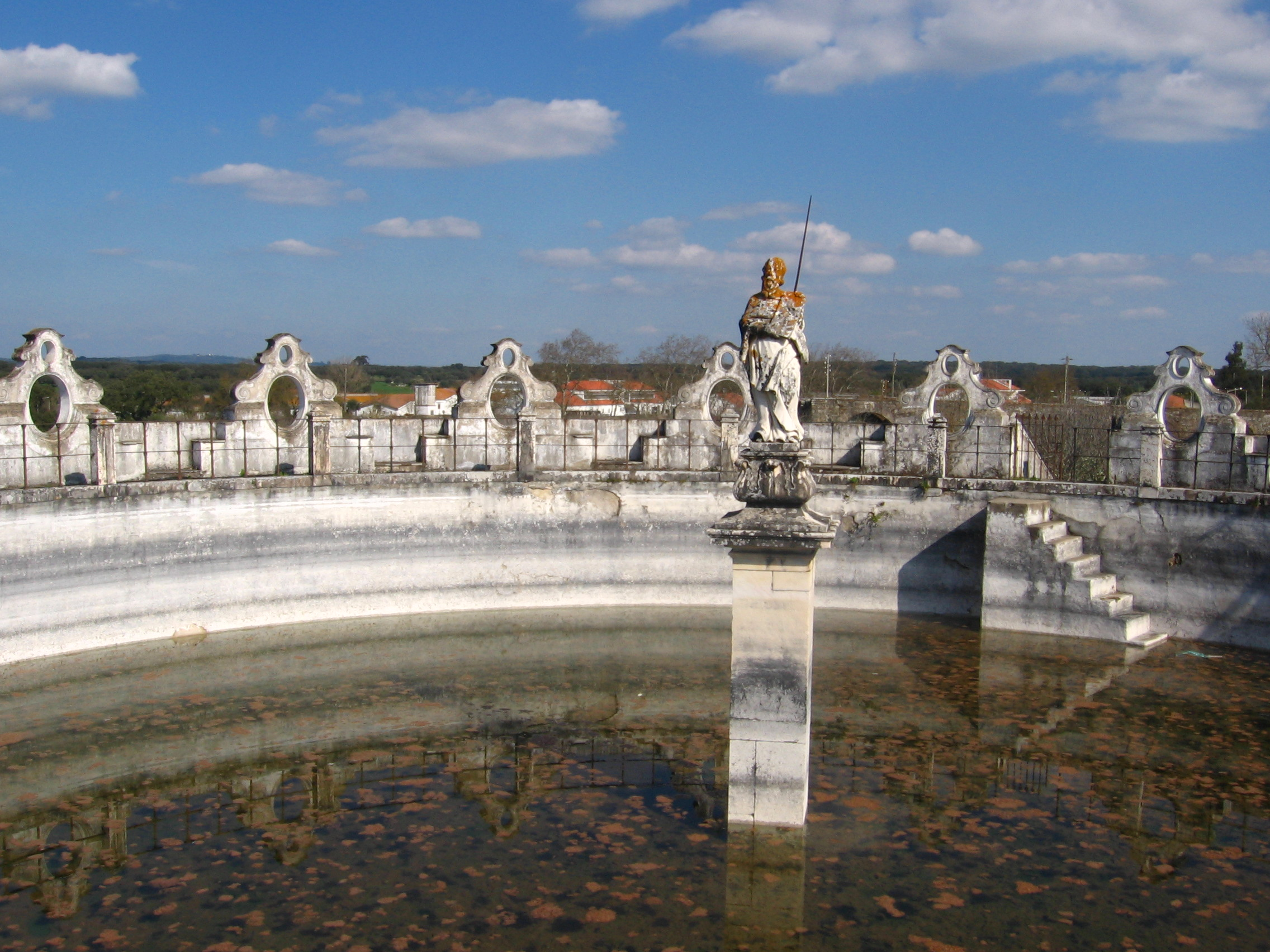 Lago com estátua de Moisés, jardim da Quinta do Paço de Valverde, Évora